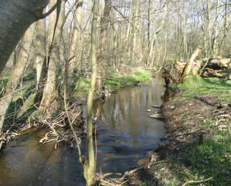 Schwingelauf südlich des Ortes Pustow